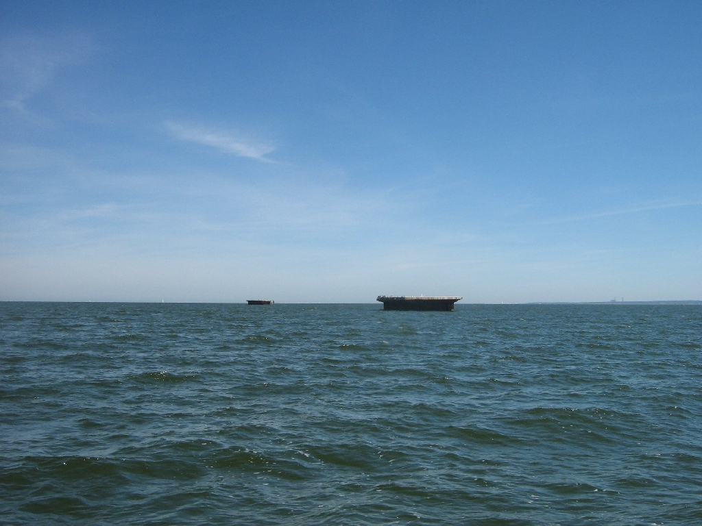 Erdölbohrplattformen im Greifswalder Bodden.